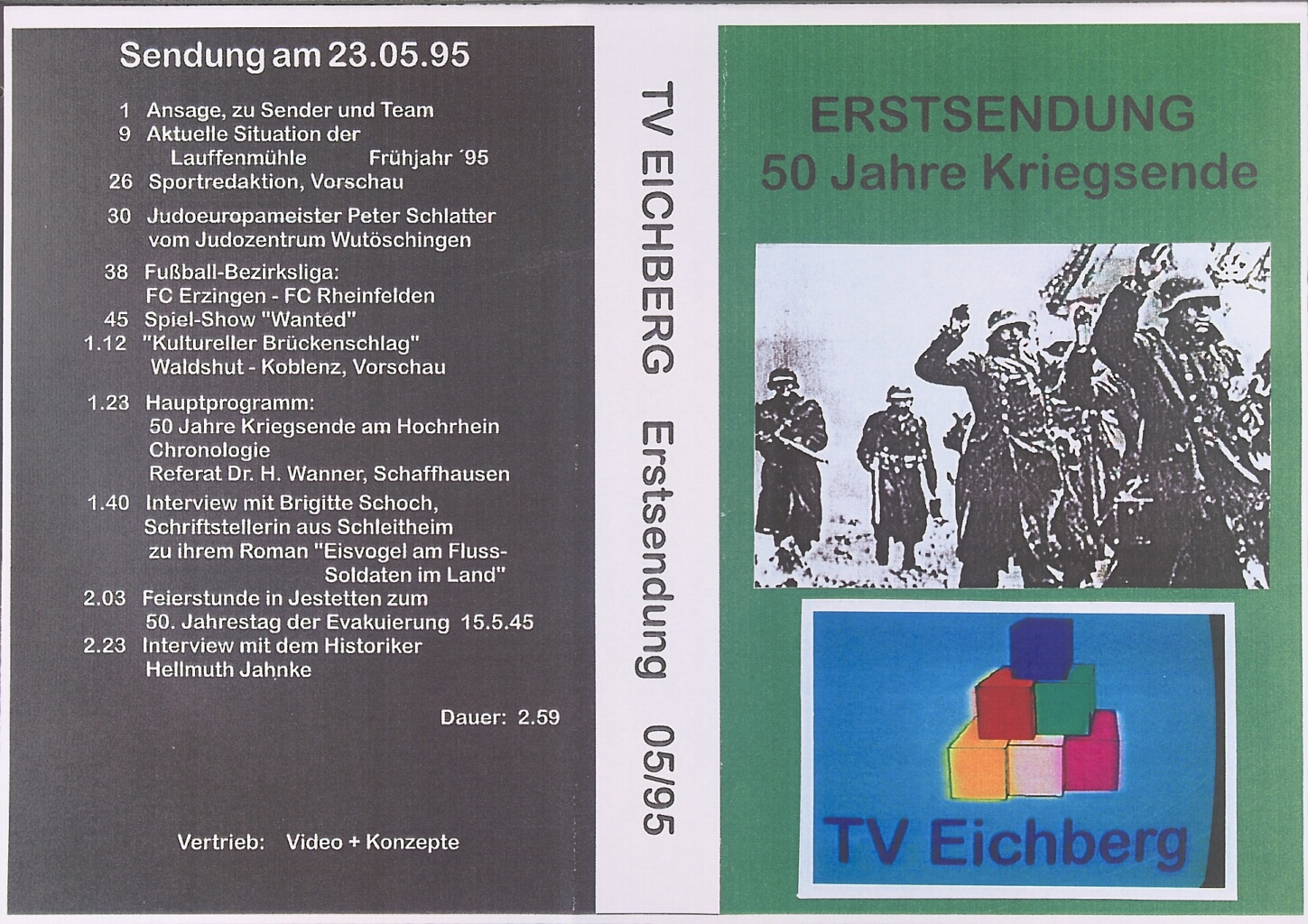 Erstsendung des Lokalsenders TV Eichberg im Landkreis Waldshut-Tiengen, Baden-Württemberg. Thema: 50 Jahre Kriegsende in der Region 1995.